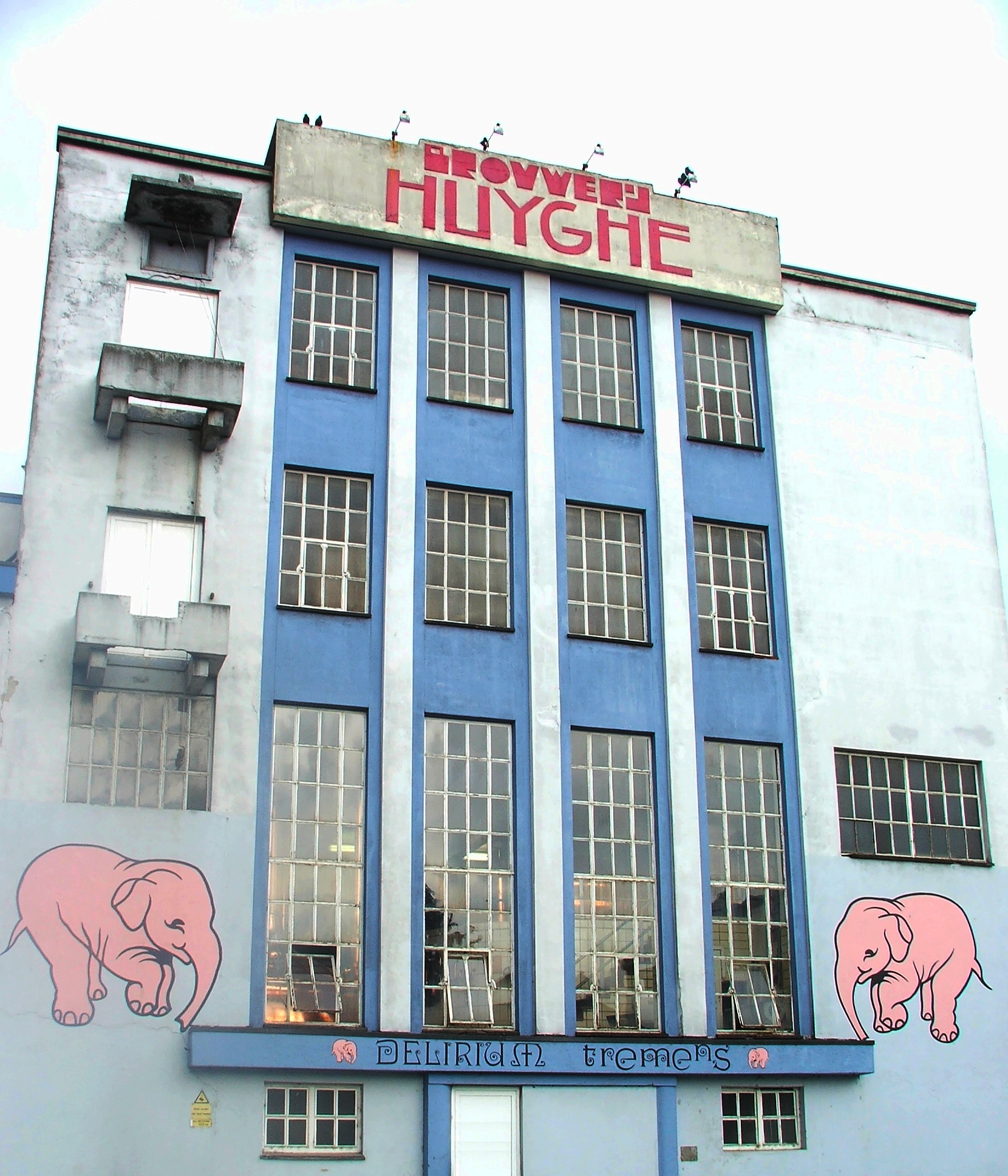 Façade de la Brasserie Huyghe à Melle (Belgique)